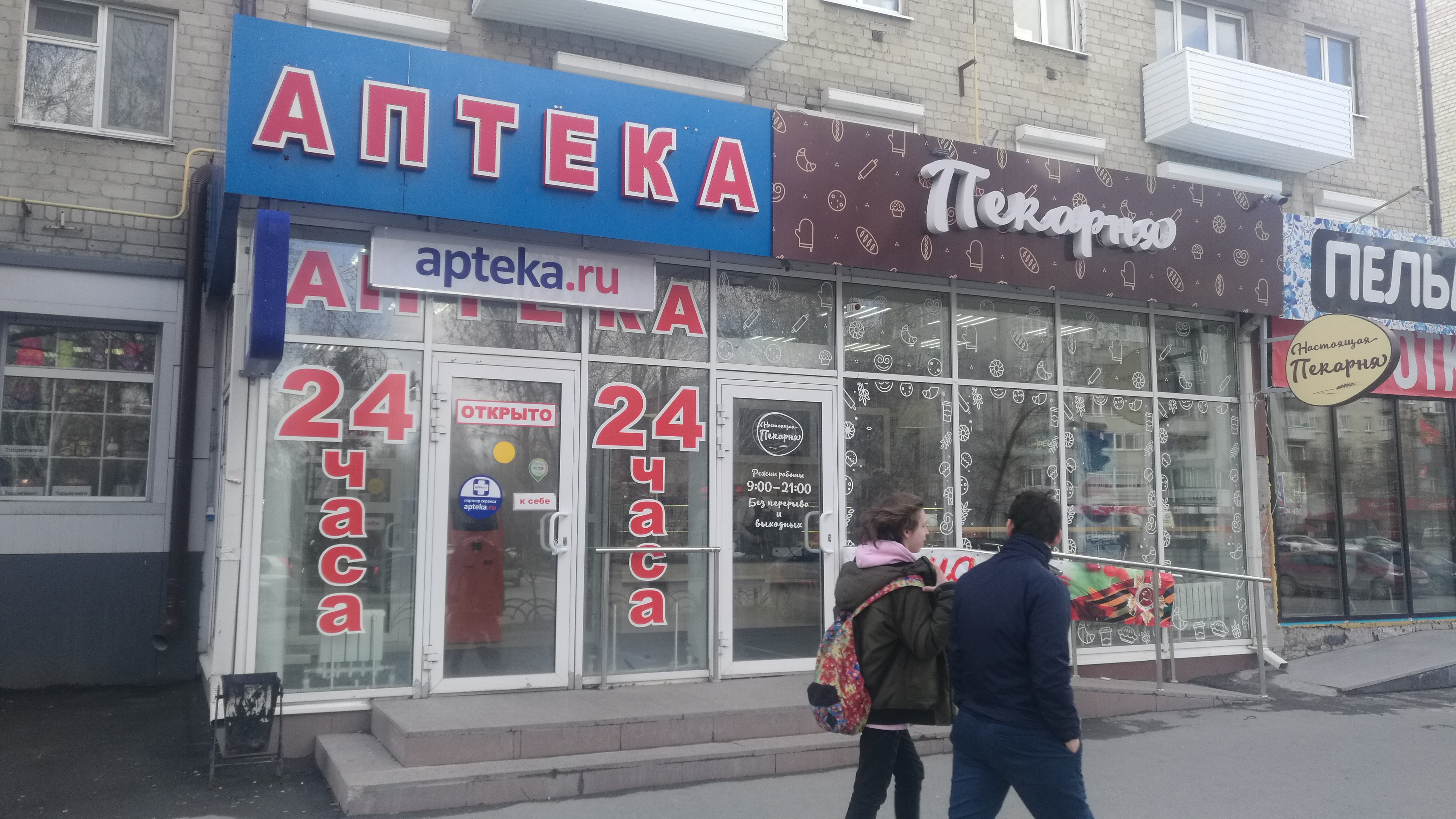 Strato Respubliko. Tjumeno, Rusio.